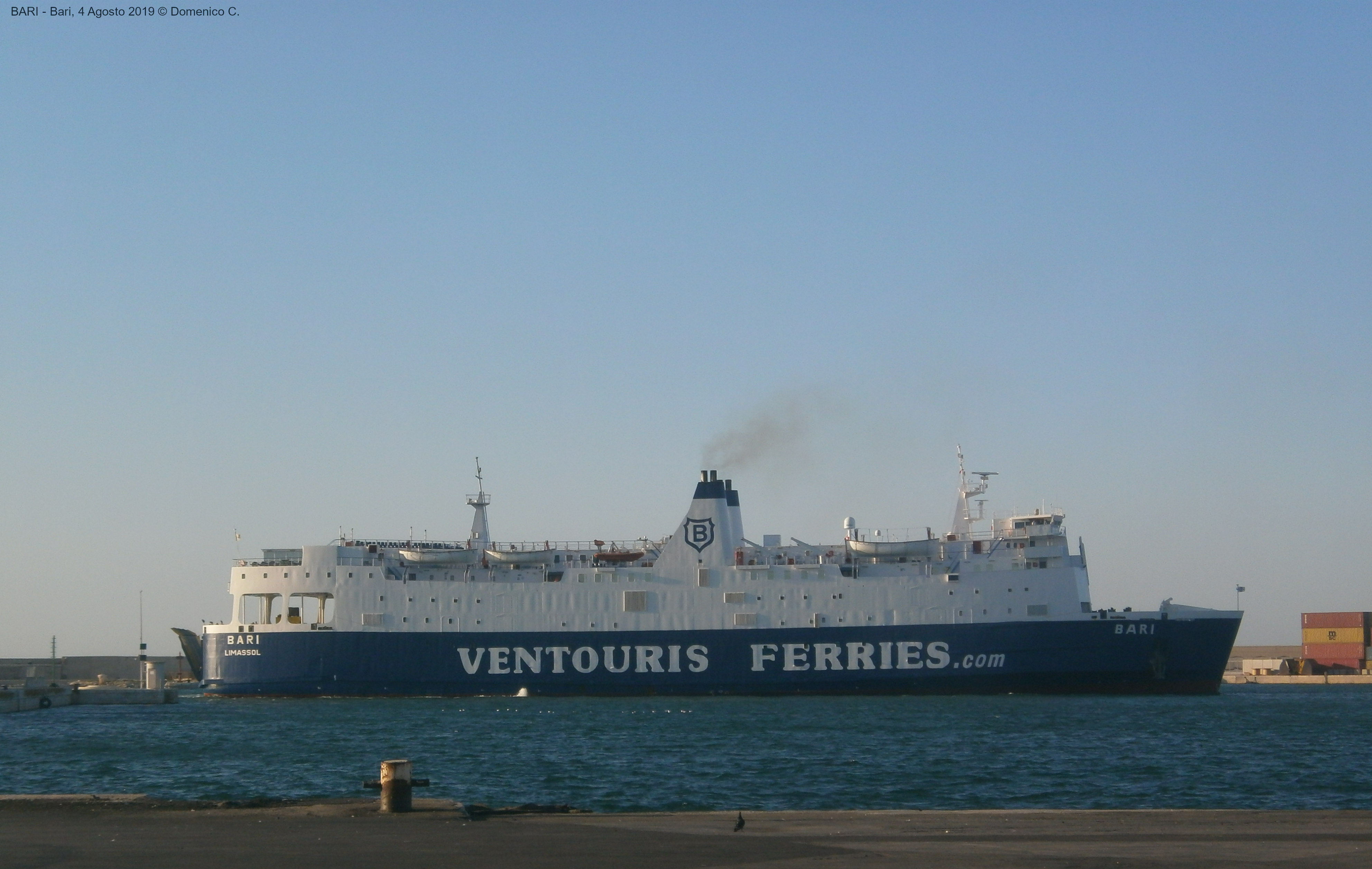 Traghetto Bari della Ventouris Ferries, in manovra presso il porto di Bari (4 Agosto 2019)